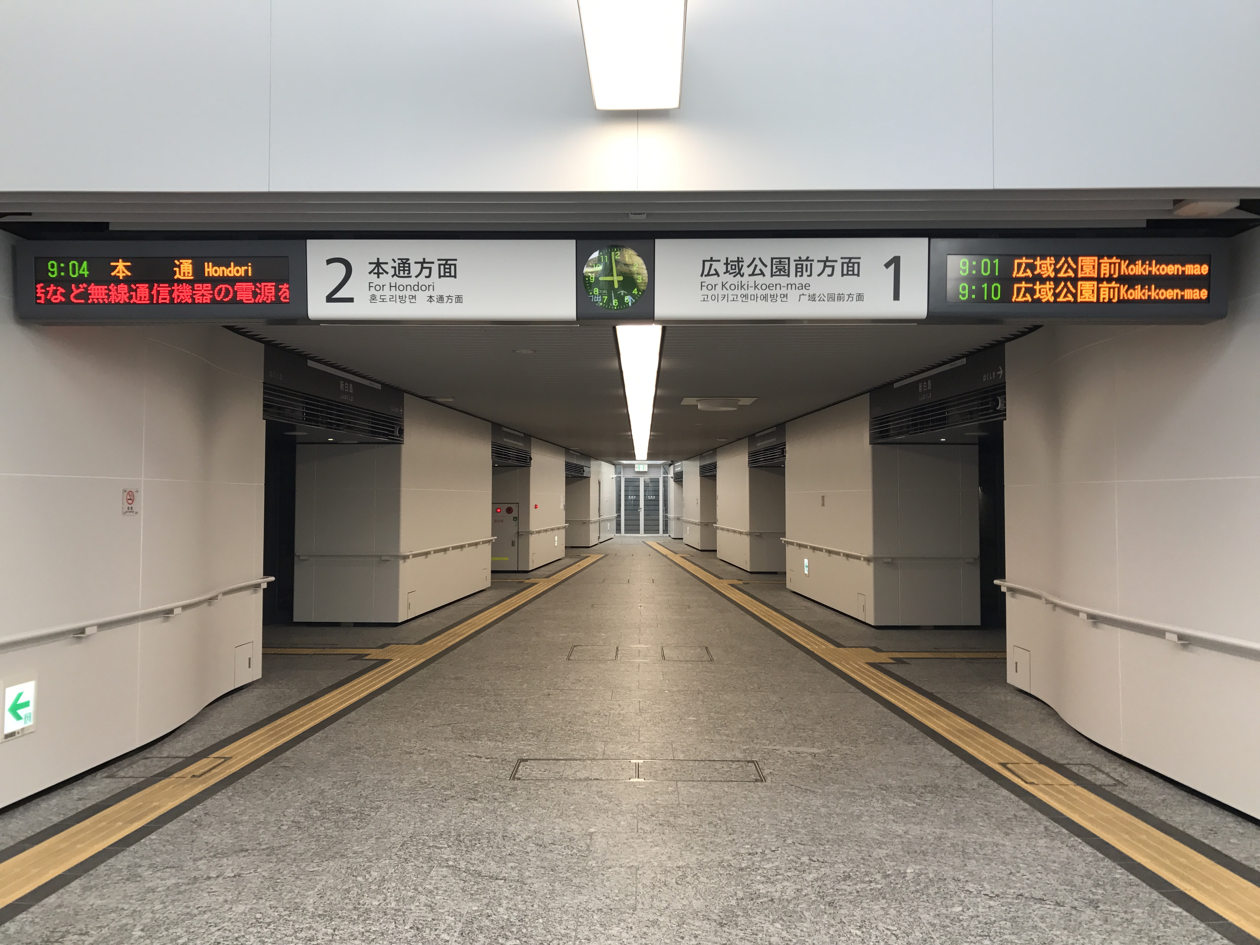 新白島駅(アストラムライン)のホーム(奥は城北方面)